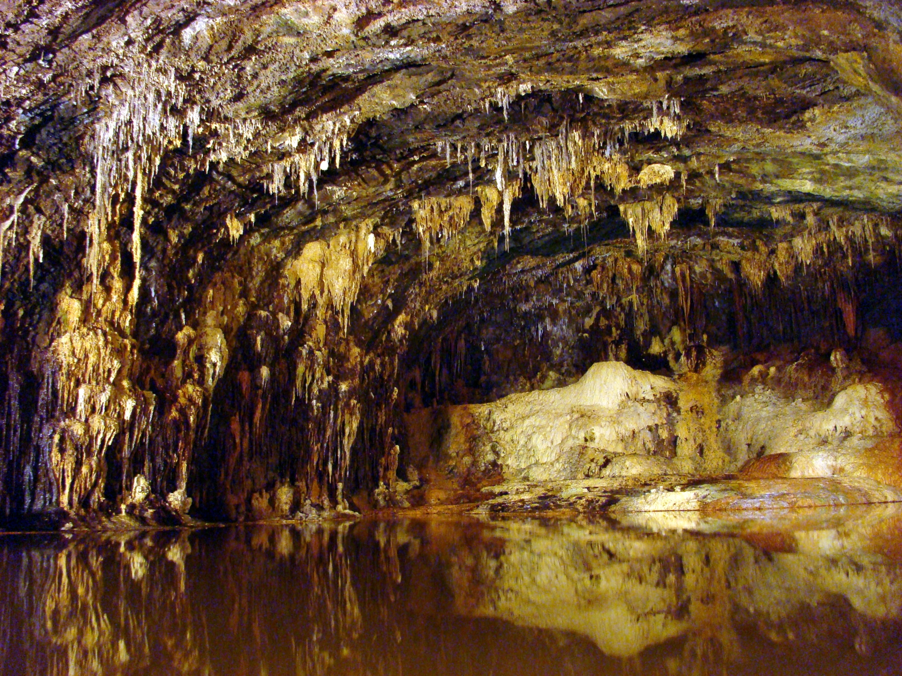 Saalfelder Feengrotte